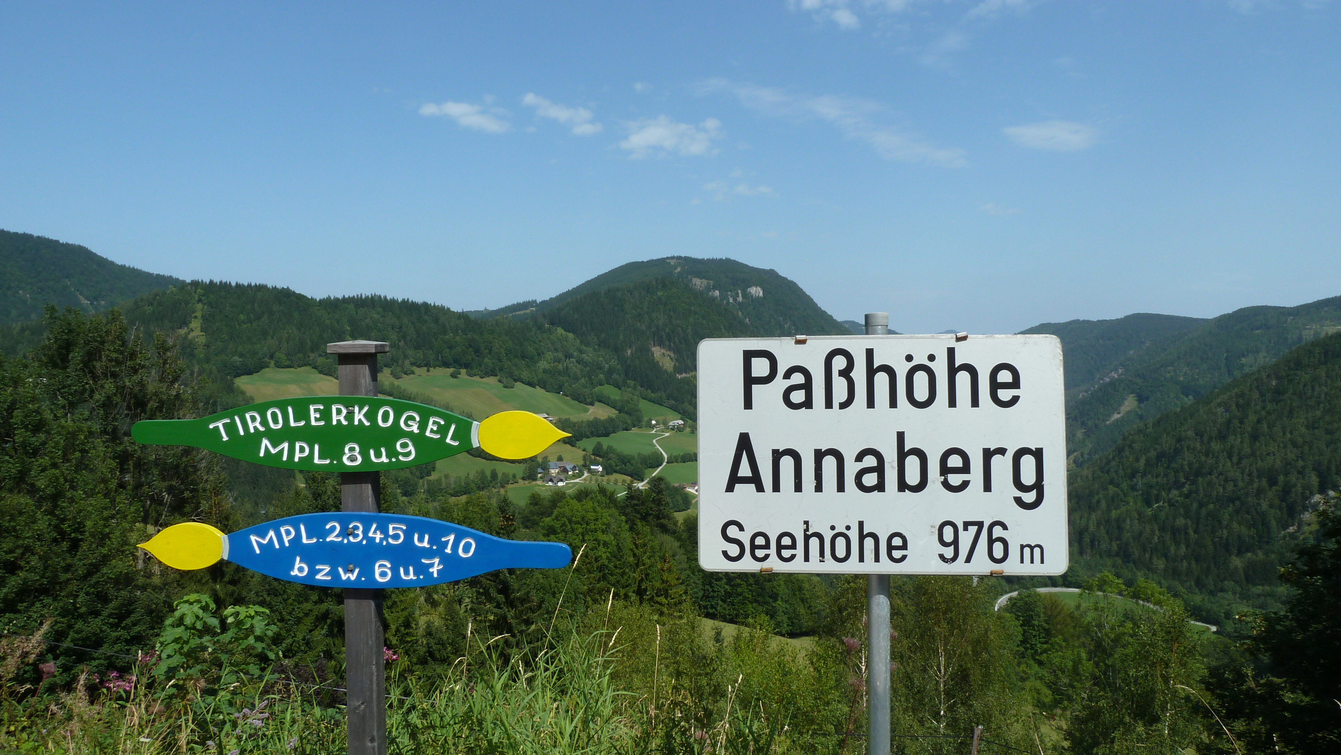 Passhöhe Annaberg